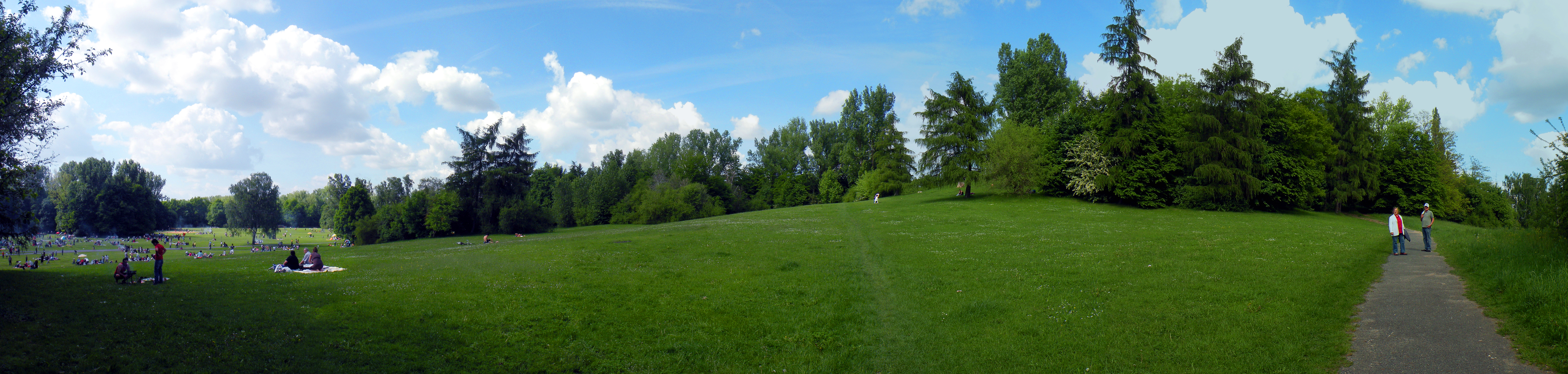 Нюрнберг.Народный парк Мариенберг